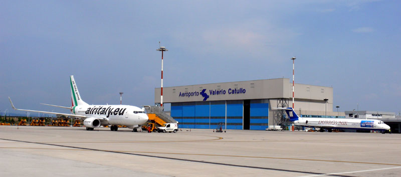 Hangar dell'aeroporto Valerio Catullo a VILLAFRANCA di Verona